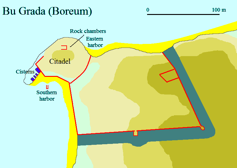 خريطة توضحية